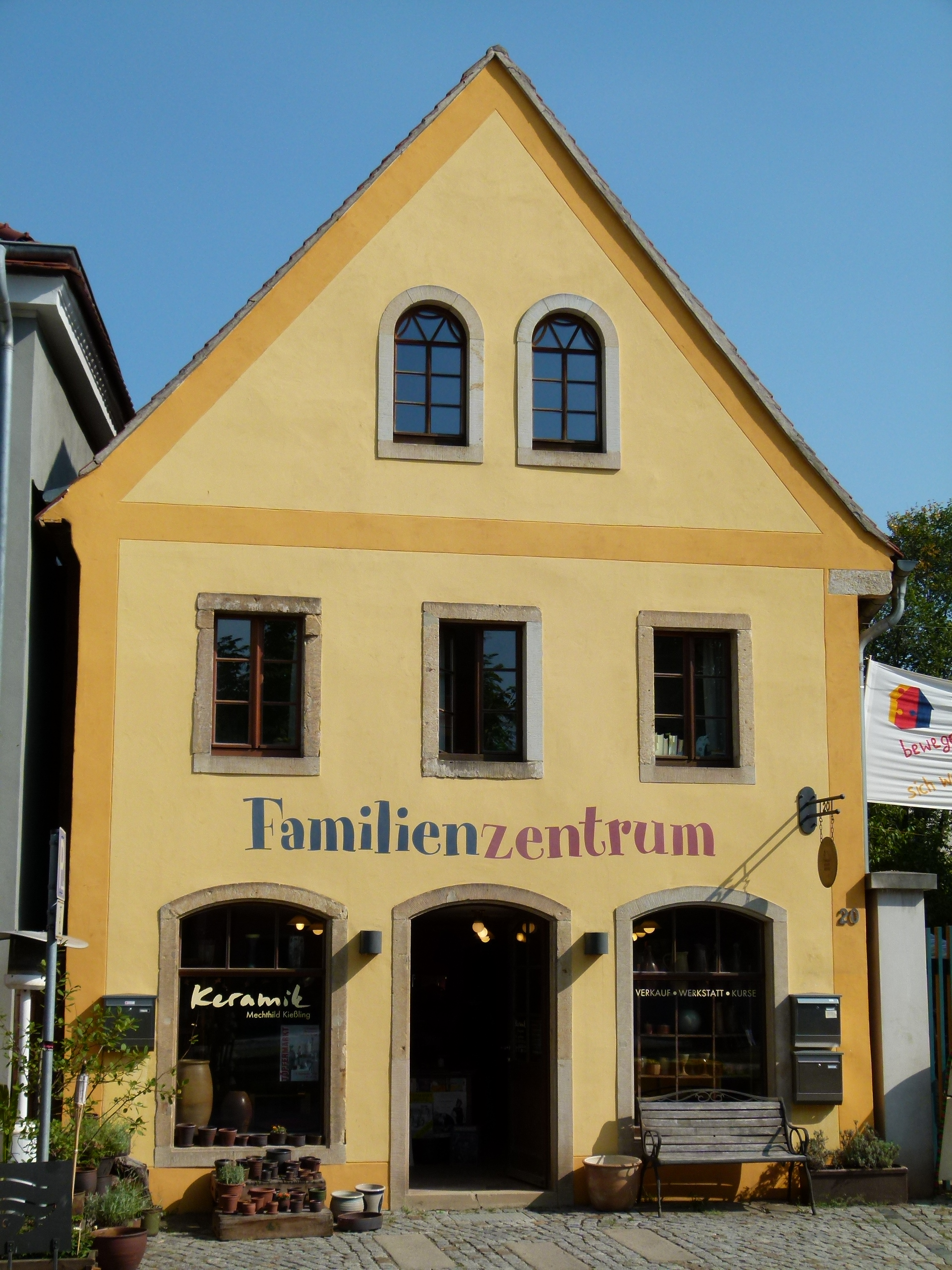 Denkmalgeschütztes Haus, Altkötzschenbroda 20, Radebeul, Sachsen